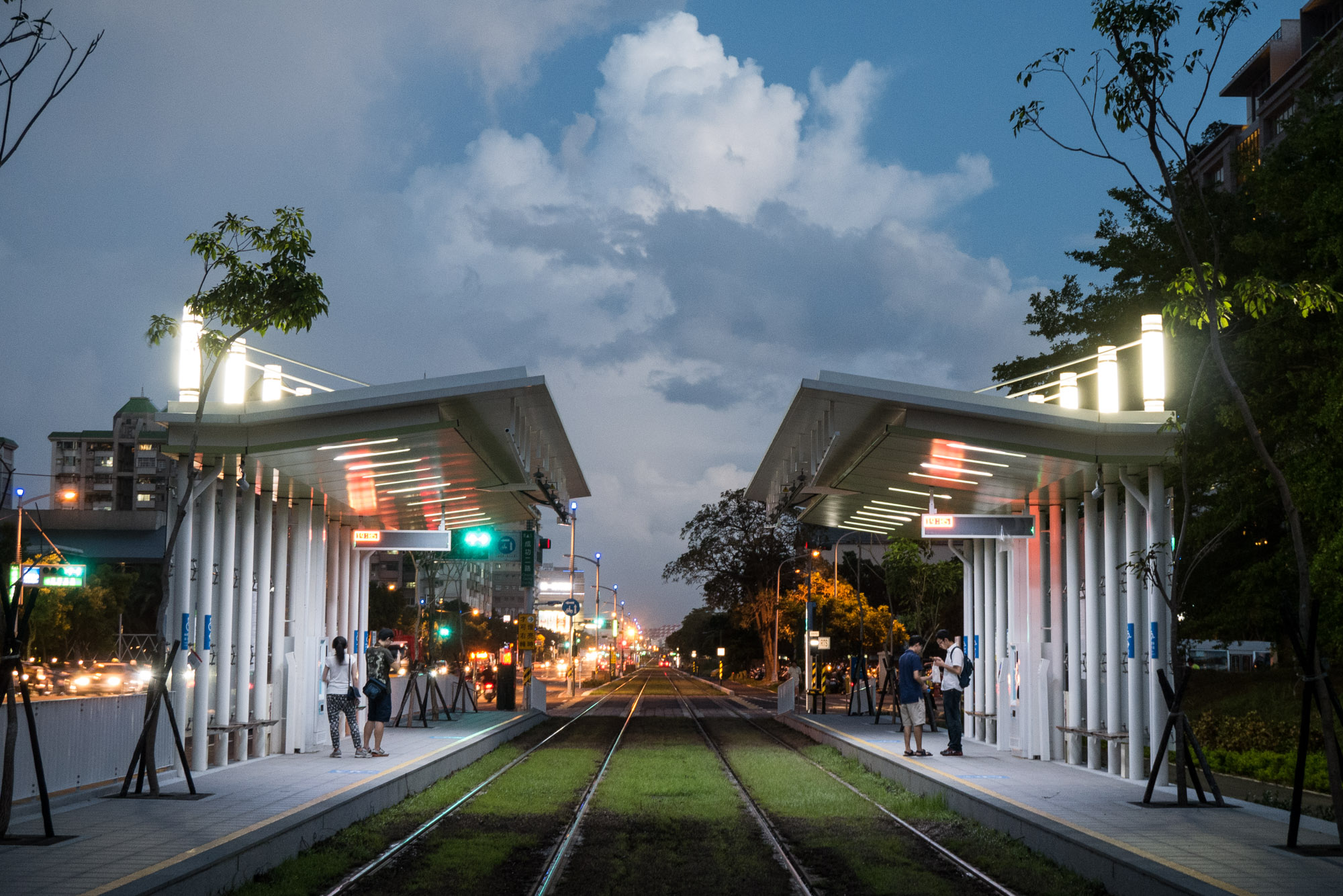 軟體園區站